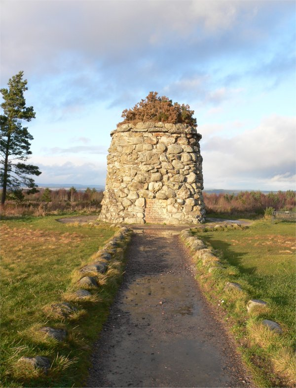 Memorial at Culloden Battle Field, Scotland